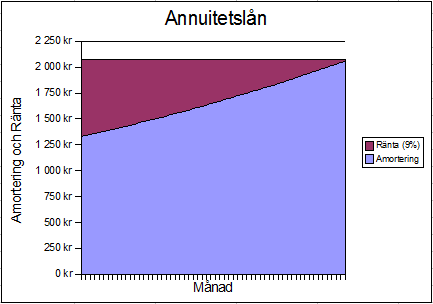 swedish loan model (Annuitetslån)